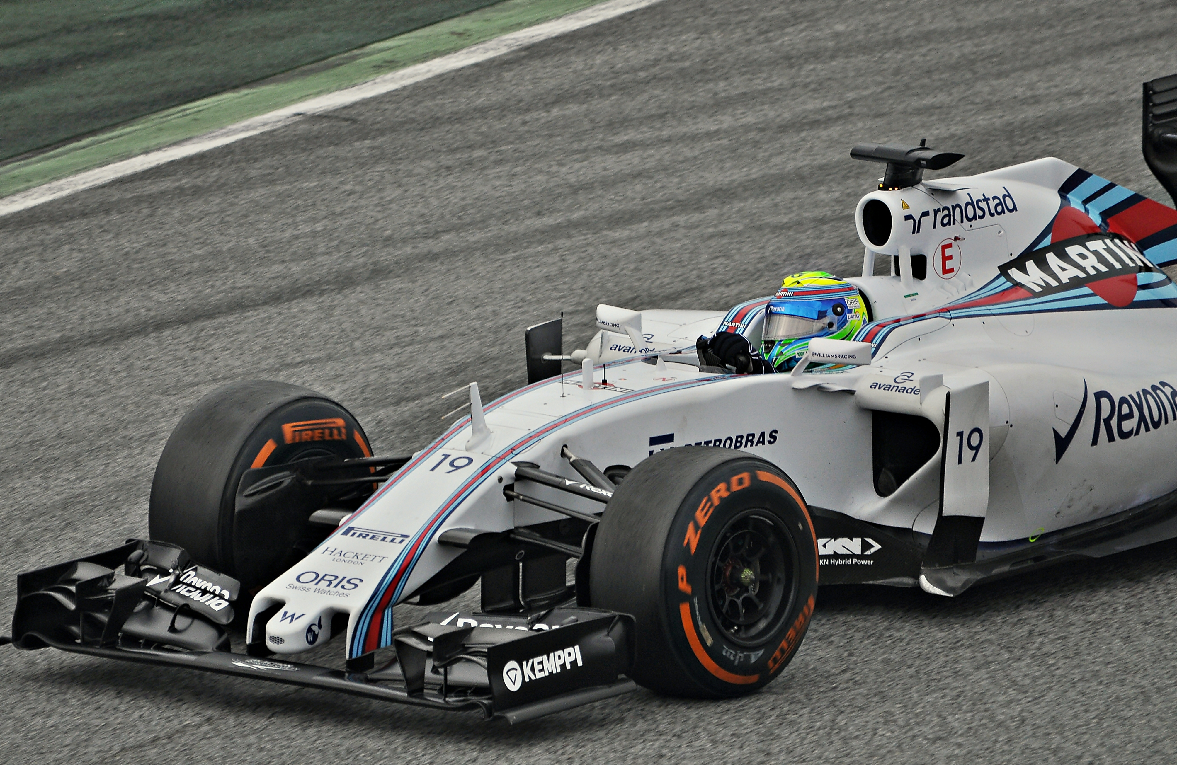 Test days Barcelona 2015